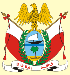 Coa Dubai